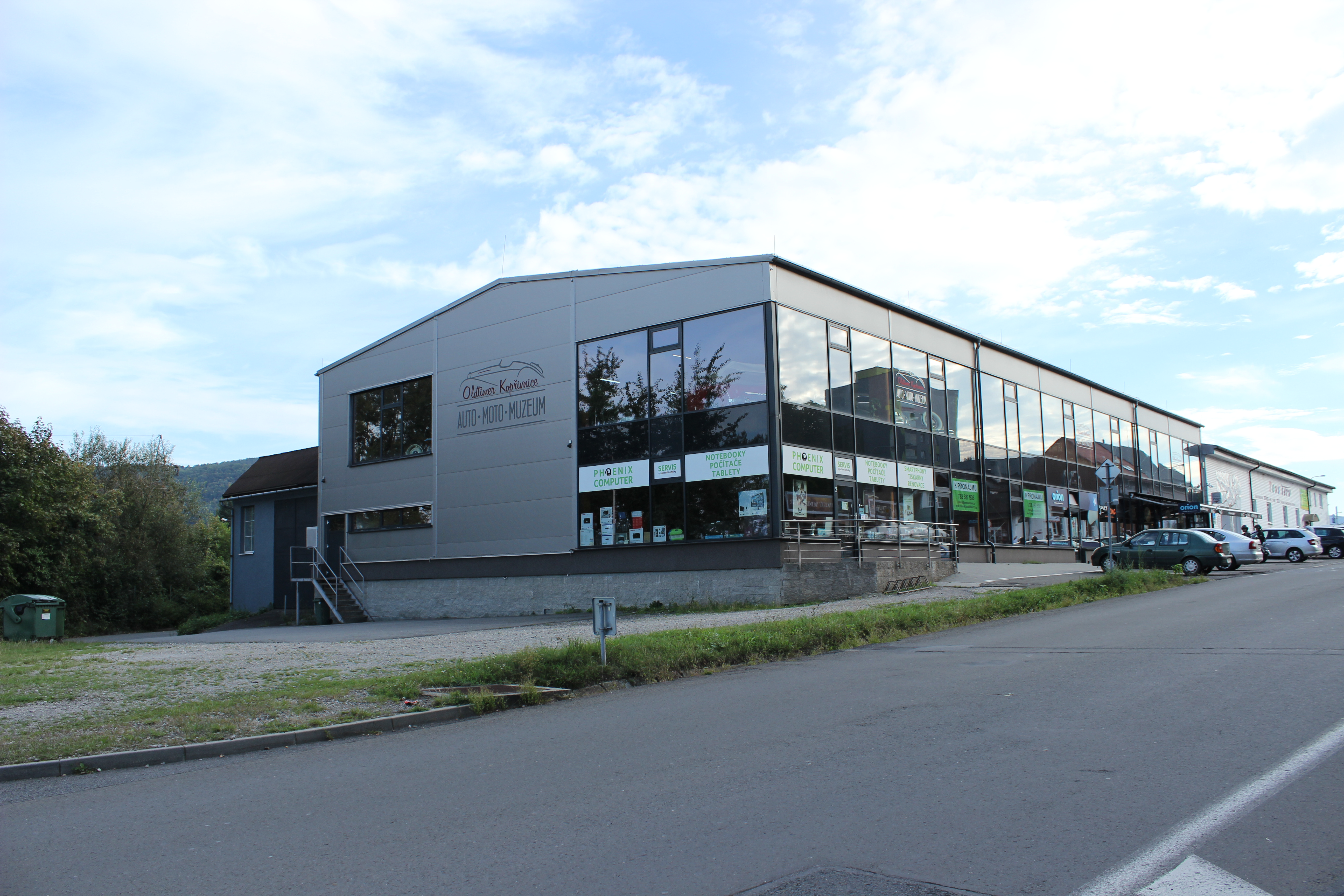 Kopřivnické muzeum veteránů. This image was acquired during the event Wikiměsto Kopřivnice.